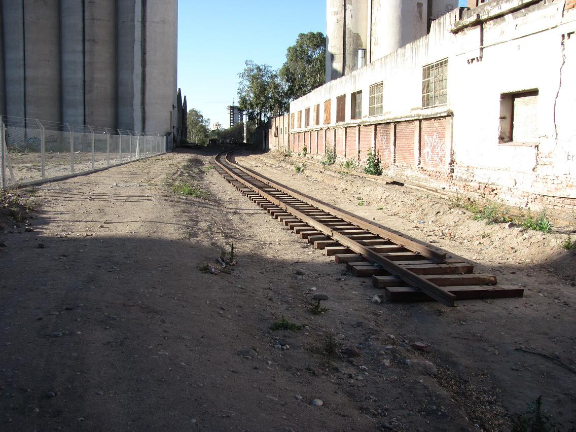 Obras del ramal CC7 hacia la estación Córdoba Mitre.